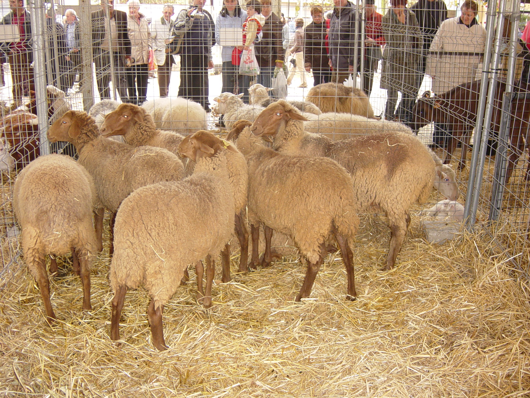 Grup d'ovelles mallorquines roges a la fira del Dijous Bo a Inca, Mallorca